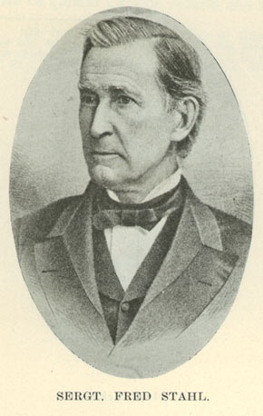 Sergt. Fred Stahl, soldier in the 1832 U.S. Black Hawk War